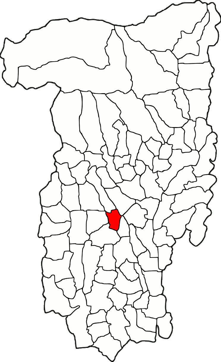 Lage der Gemeinde Roești im Kreis Vâlcea (RO).